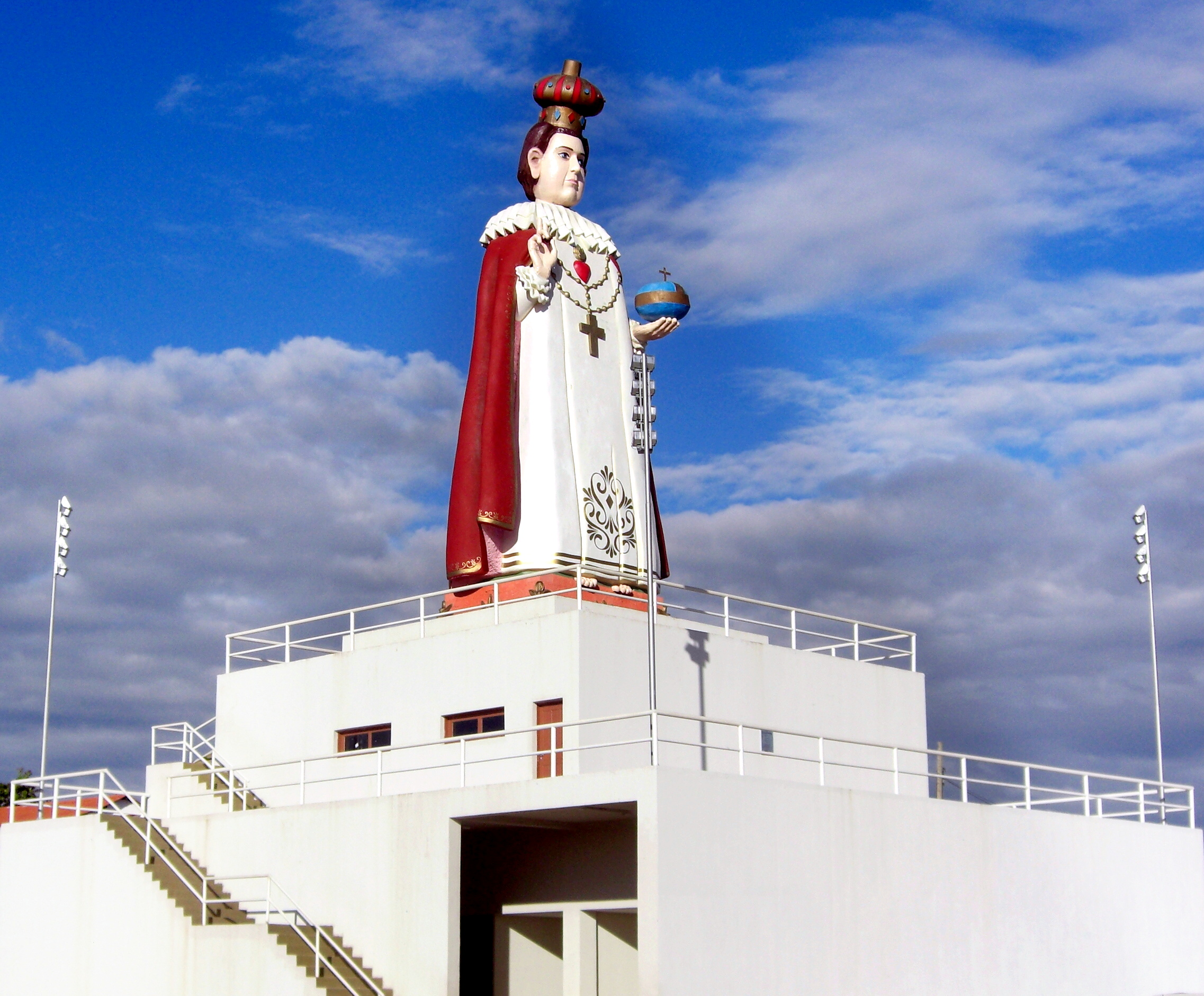 Monumento ao Menino Jesus de Praga